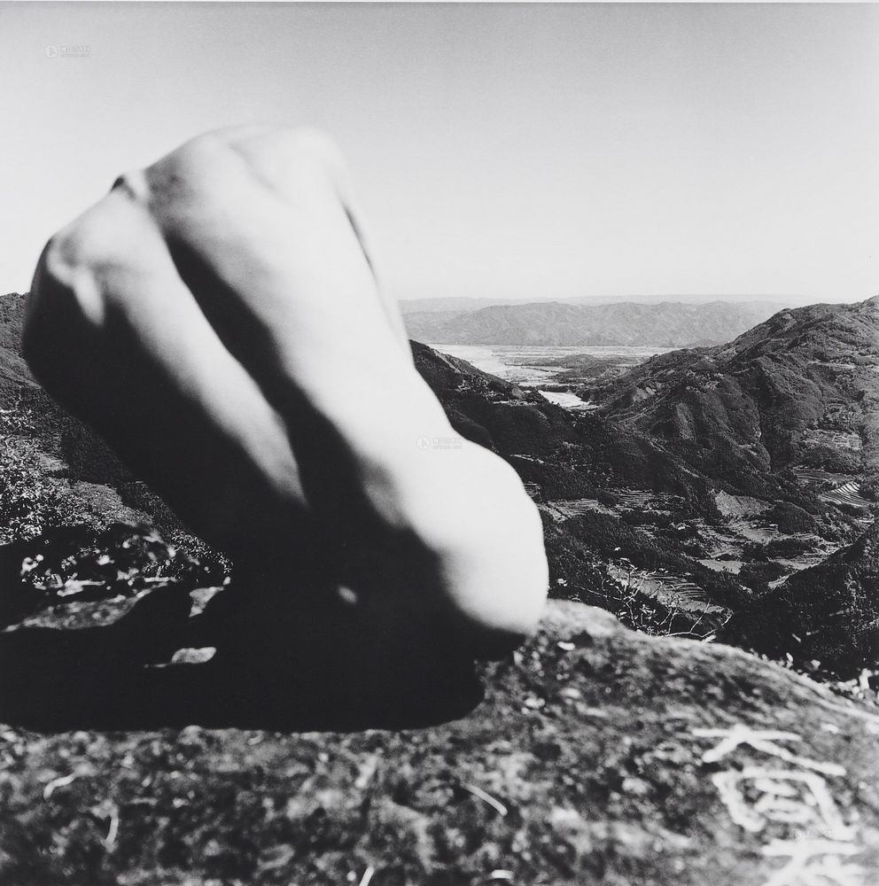 中文（台灣）: 如圖所顯示